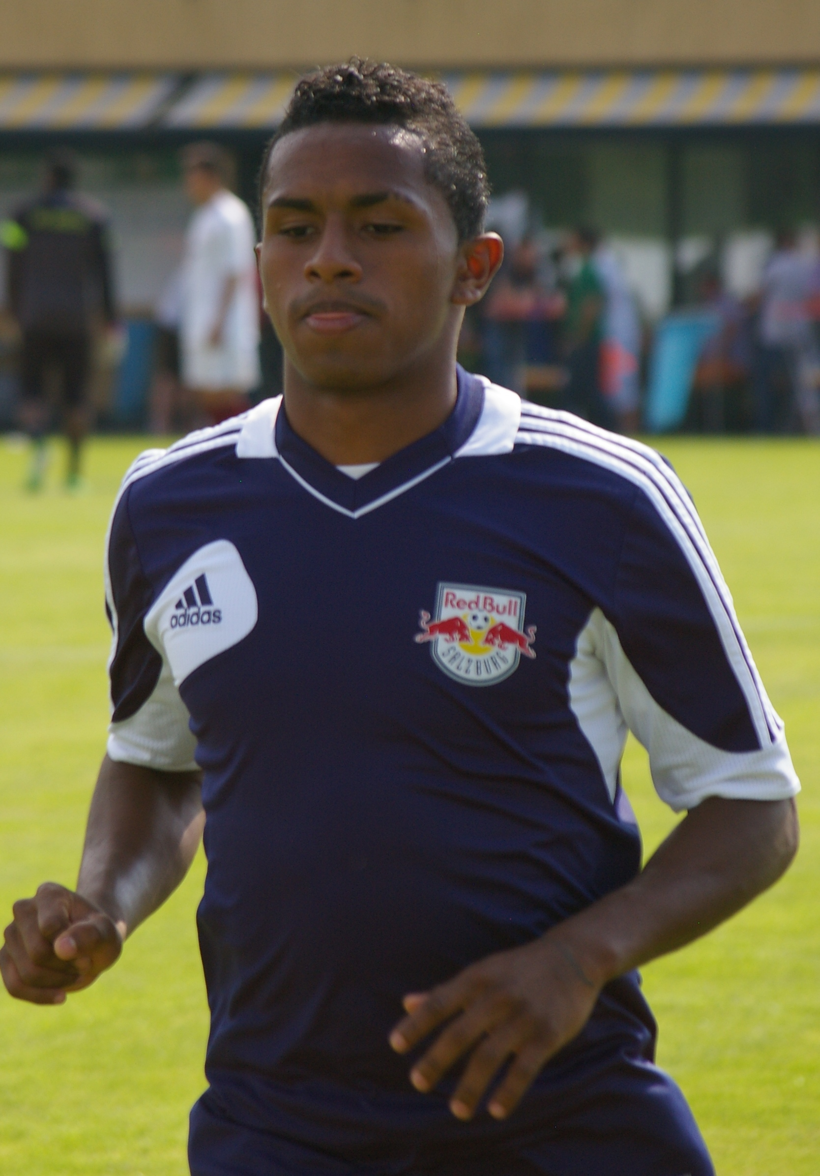 Mittelfeldspieler RB Salzburg